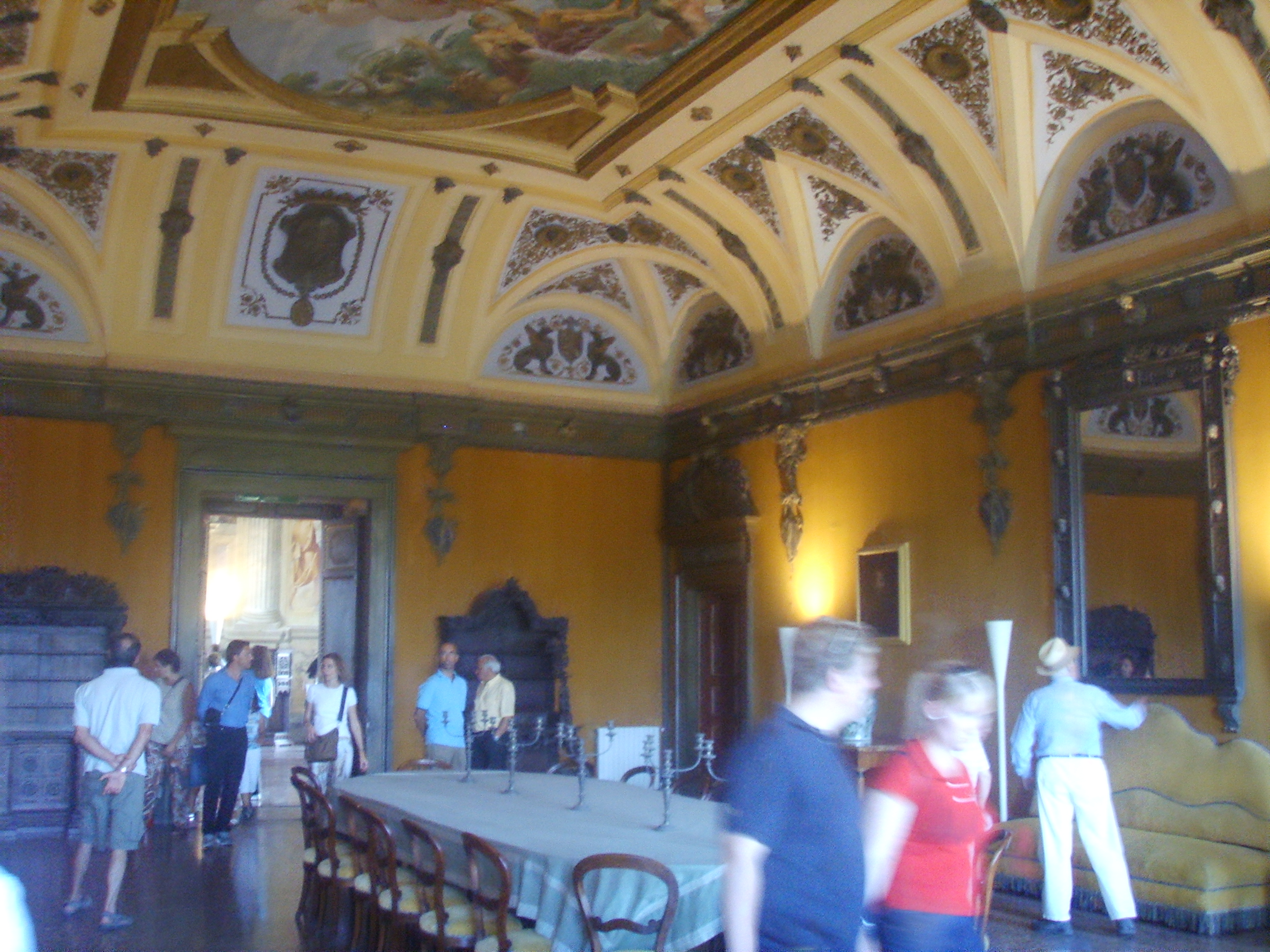 Villa medicea di Poggio a Caiano, inside sala degli stucchi in Poggio a Caiano, Italy